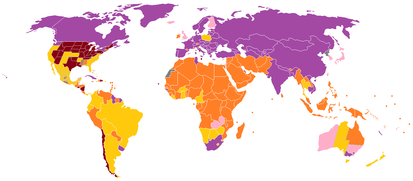 Cette carte indique le statut juridique de l'avortement dans le monde. illégal dans tous les cas illégal sauf pour viols illégal sauf pour raisons de santé de la mère ou du fœtus illégal sauf pour raisons de santé de la mère ou du fœtus, pour viols légal pour raisons de santé de la mère ou du fœtus, pour viols, pour facteurs sociaux-économiques et culturels légal sur demande